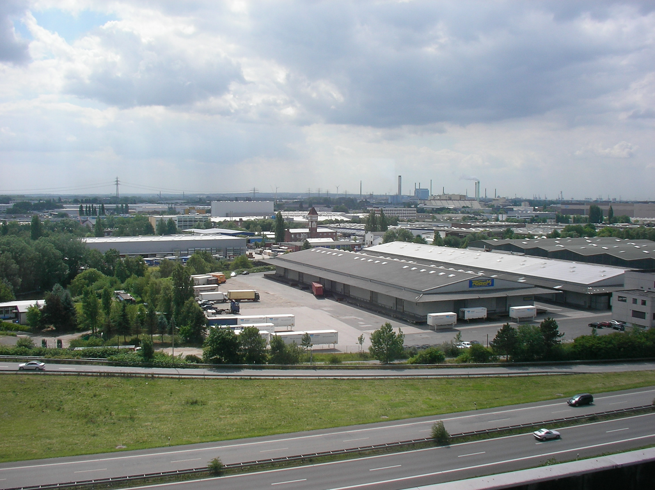 Hamburger Stadtteil Billbrook: Ein riesiges, zusammenhängendes Industrie- und Gewerbegebiet, das eine Ausdehnung von etwa drei mal drei Kilometern aufweist. Das Foto zeigt die Nord-Süd-Ausdehnung von der B5 im Norden (Vordergrund) bis zum Heizkraftwerk Tiefstack im Süden (größeres Gebäude am Horizont zwischen den Schornsteinen). Aufnahmeort ist das 9. Obergeschoss des Panorama Inn-Komplexes an der Billstedter Hauptstraße/Moorfleeter Straße.